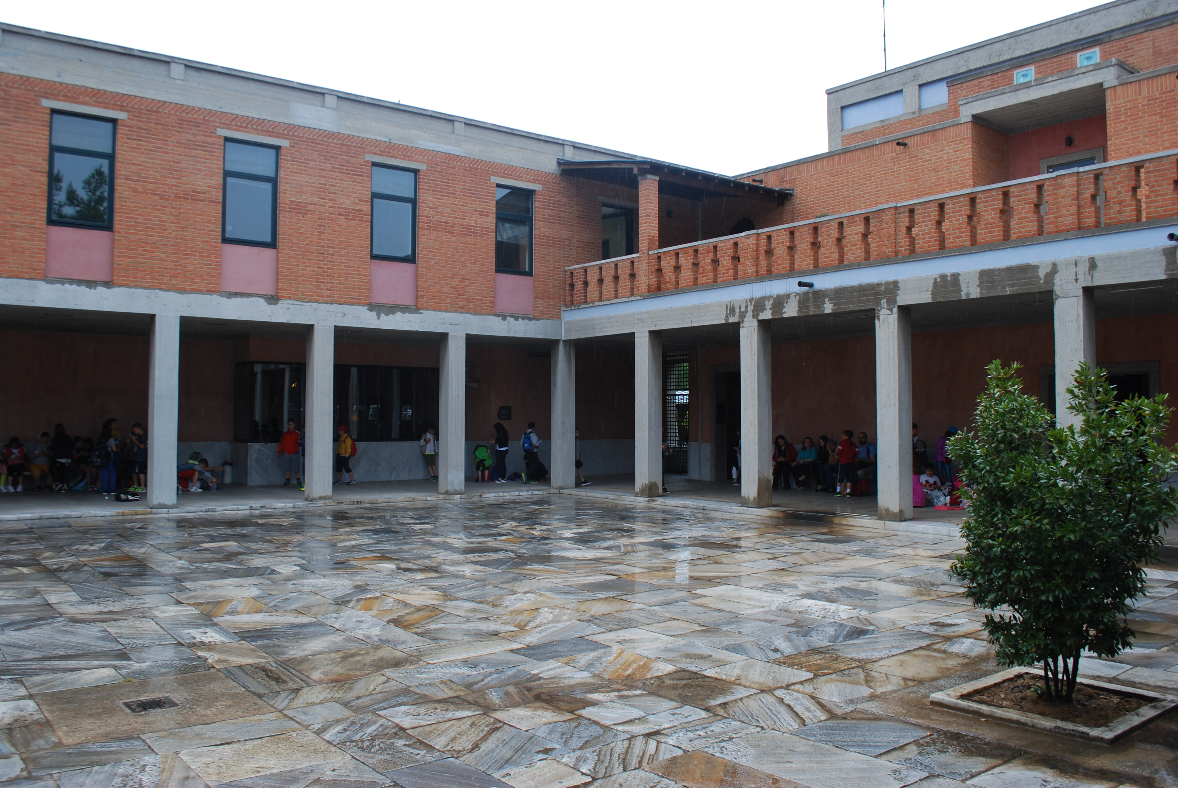 Vue du Musée de la Culture byzantine à Thessalonique (Grèce).